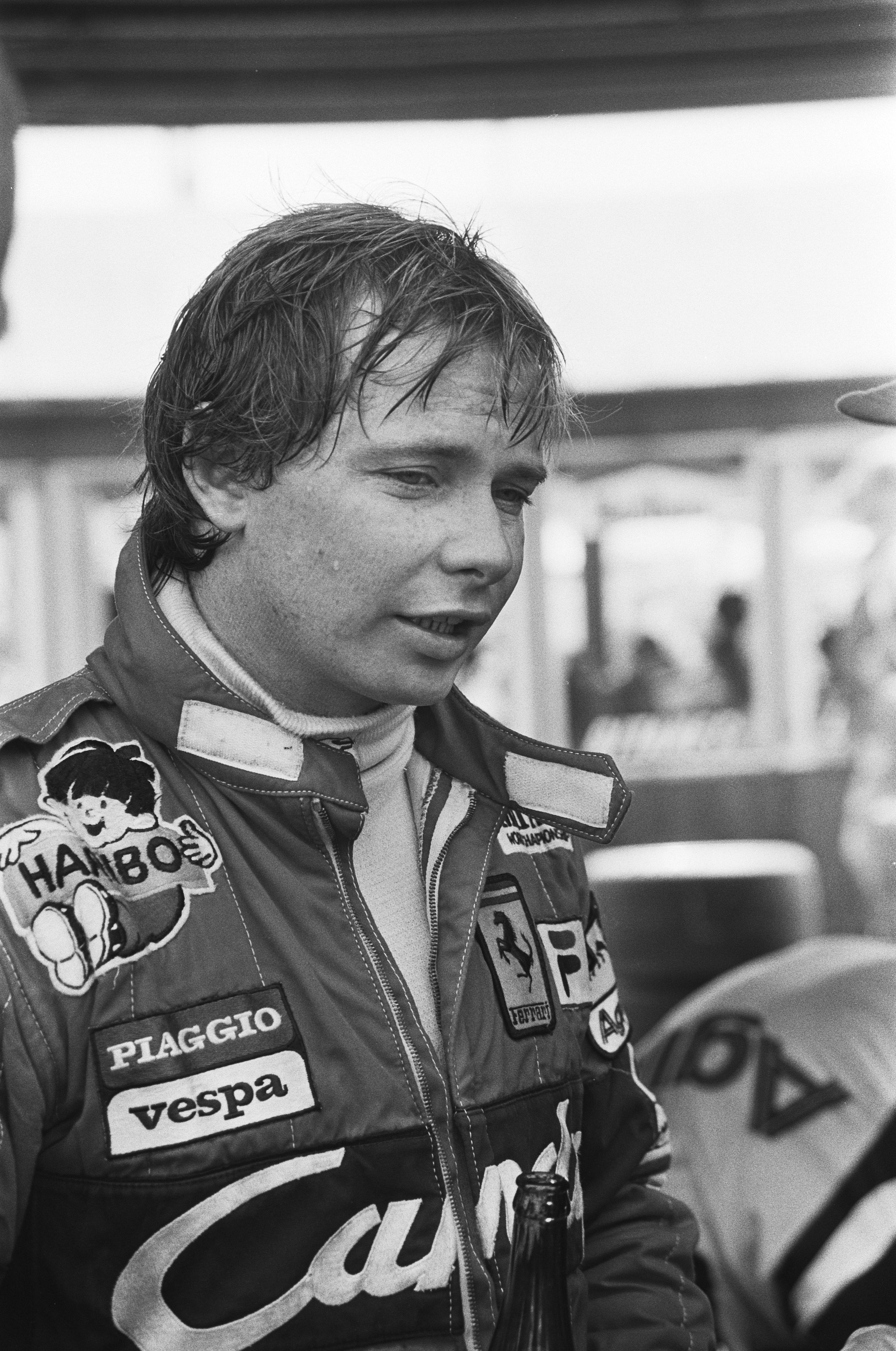 Didier Pironi lors du Grand Prix des Pays-Bas 1982 à Zandvoort.